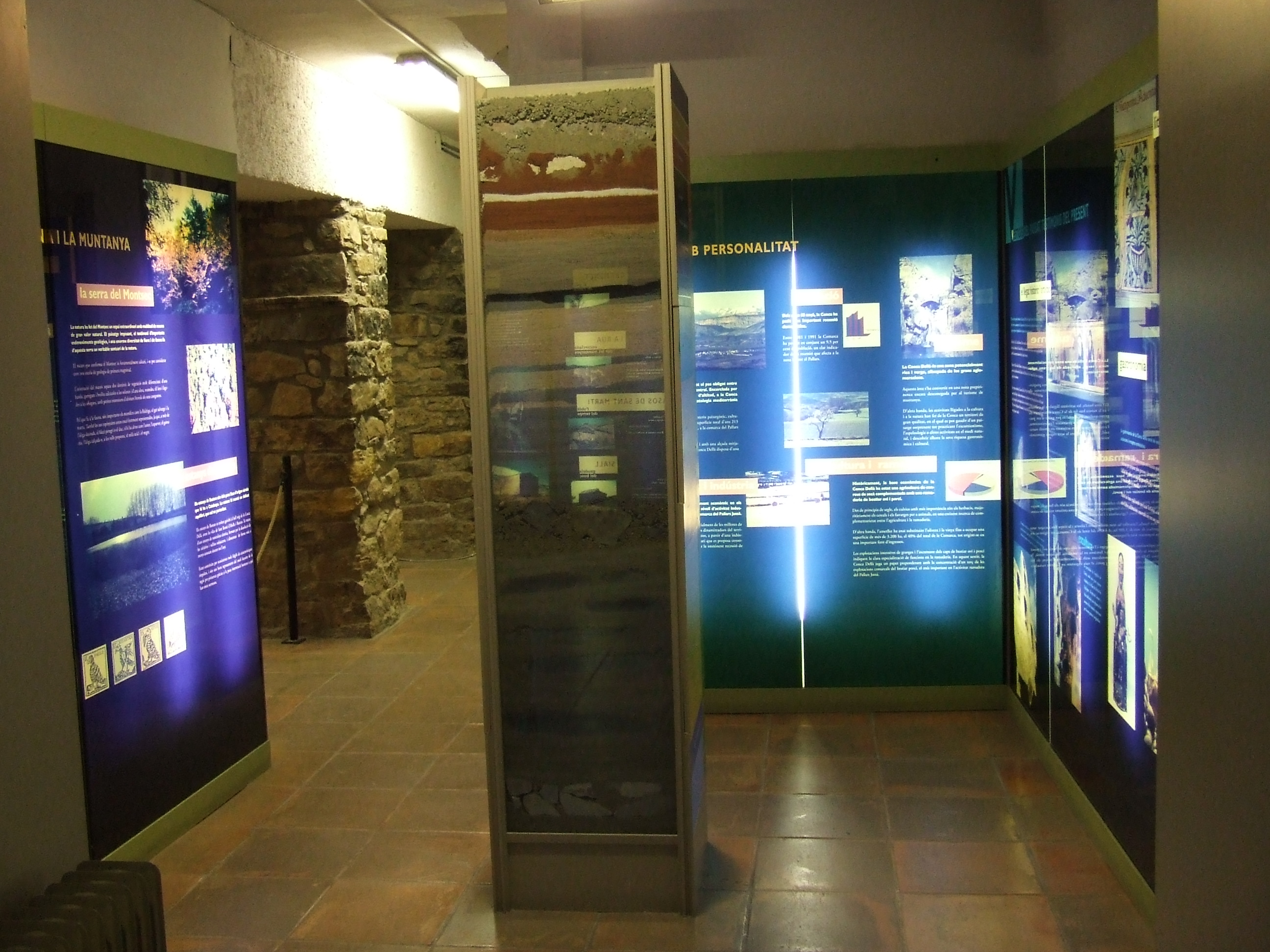 Museu de Conca Dellà (Isona, Pallars Jussà)